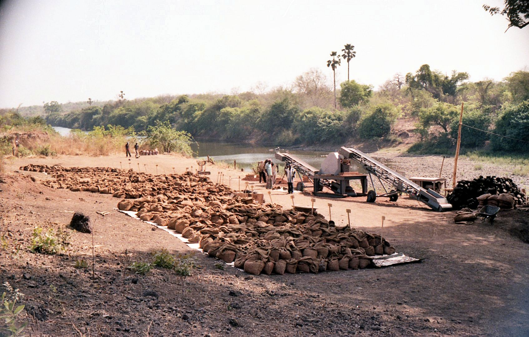 Industrial scale sampling